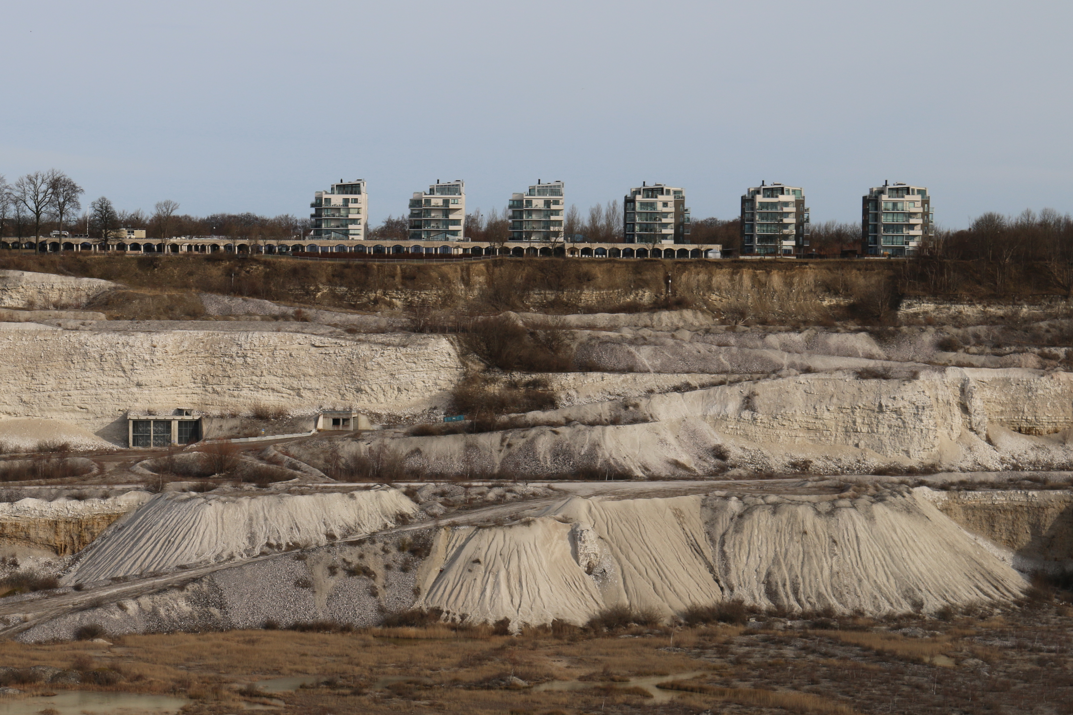 Limhamns kalkbrott i mars 2015